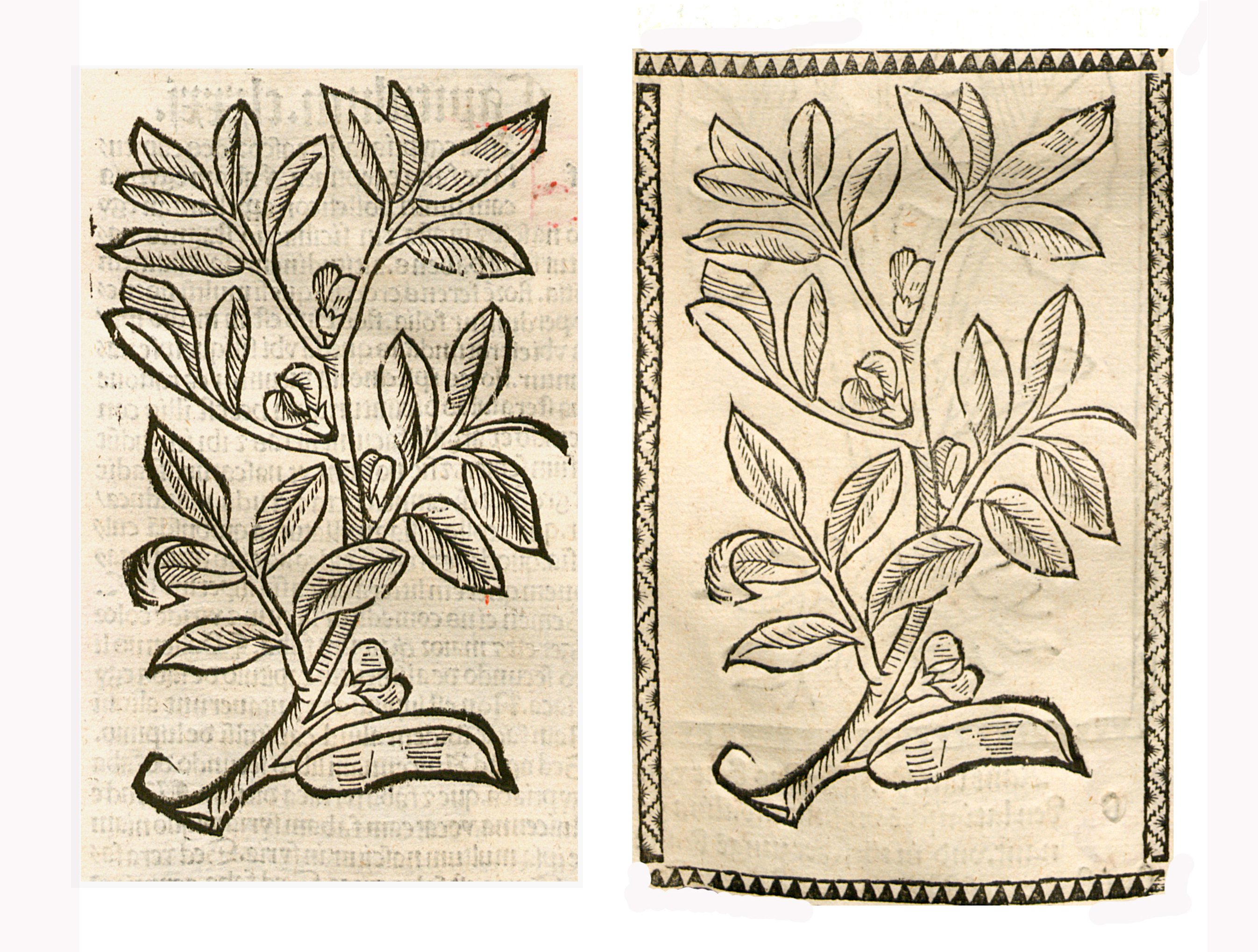 Abbildung von: Bohnen